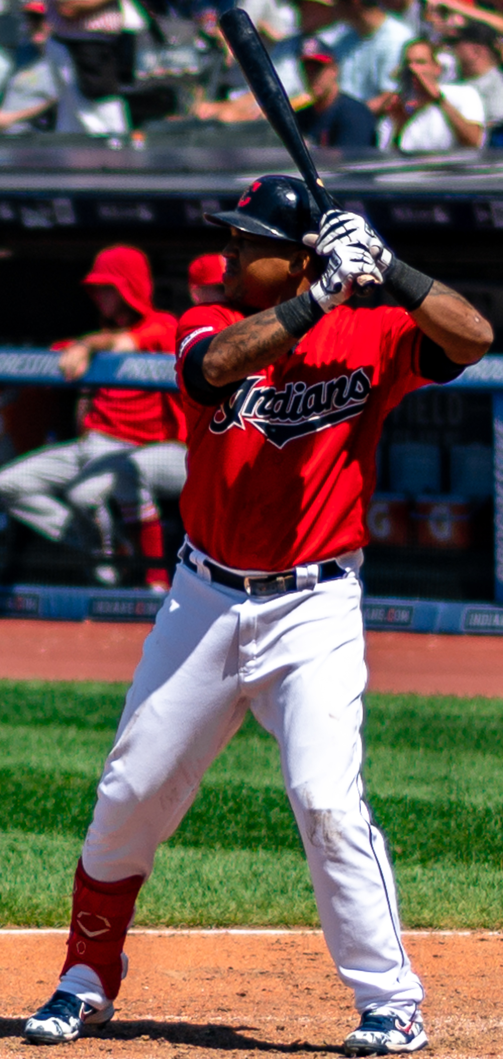 Jose Ramírez